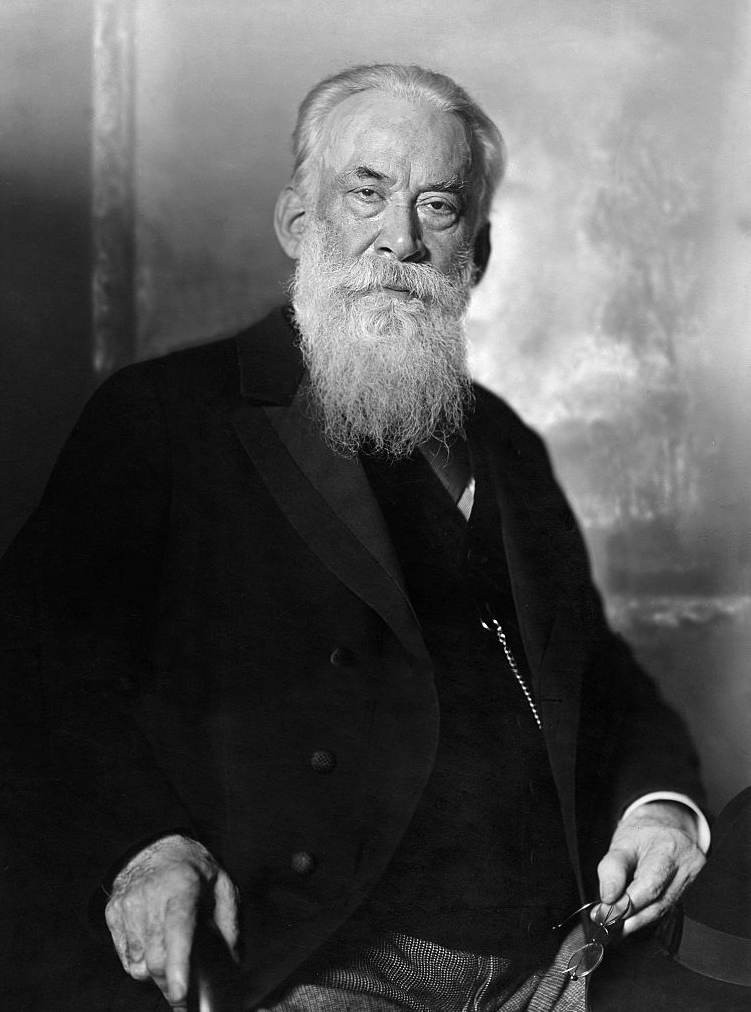 Paul Friedrich Meyerheim